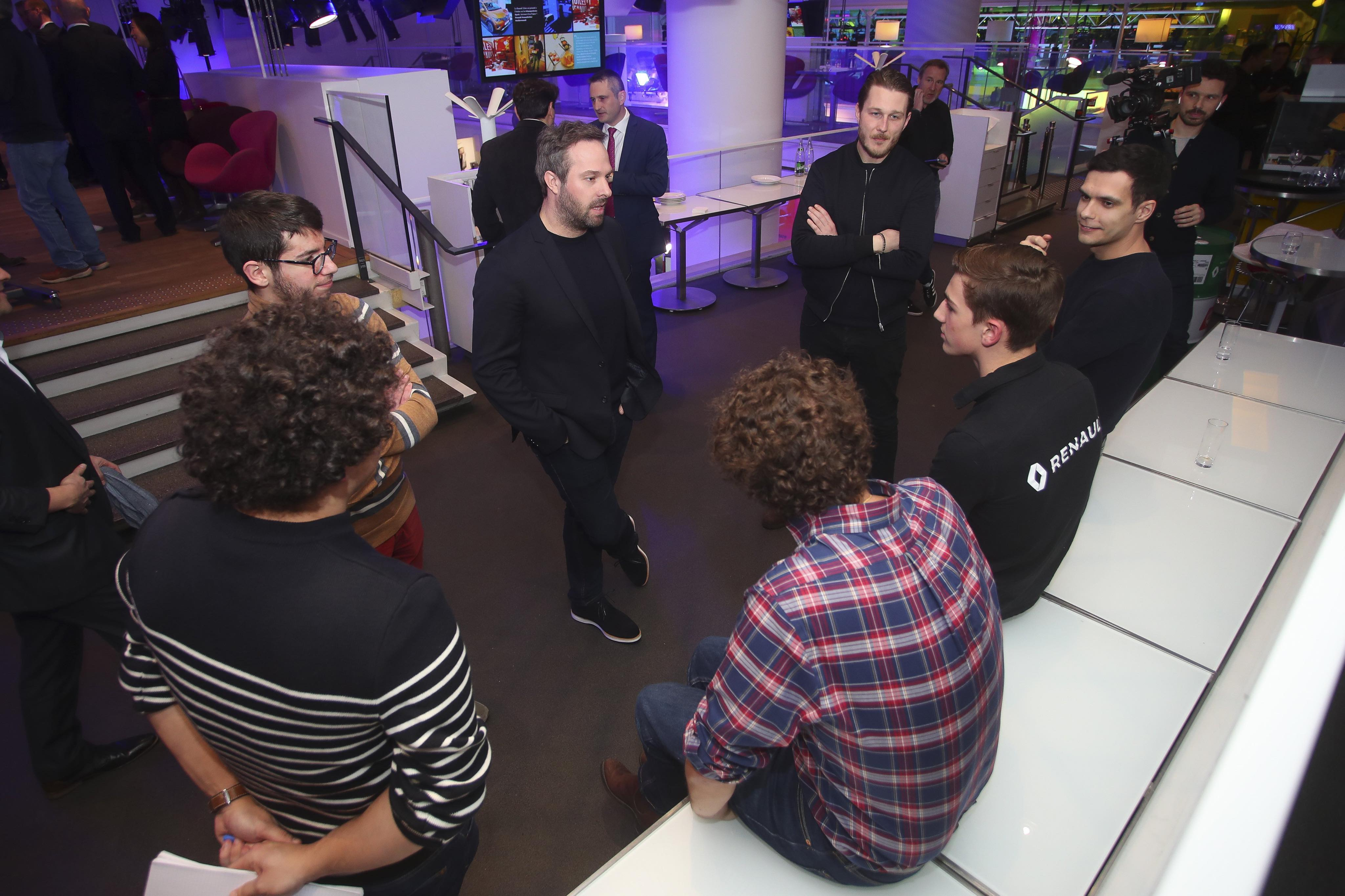 Photographie d'Hadrien David avec notamment Julien Fébreau, Pierre-Olivier Valette (alias Depielo) et Emmanuel Moine, à l'Atelier Renault.